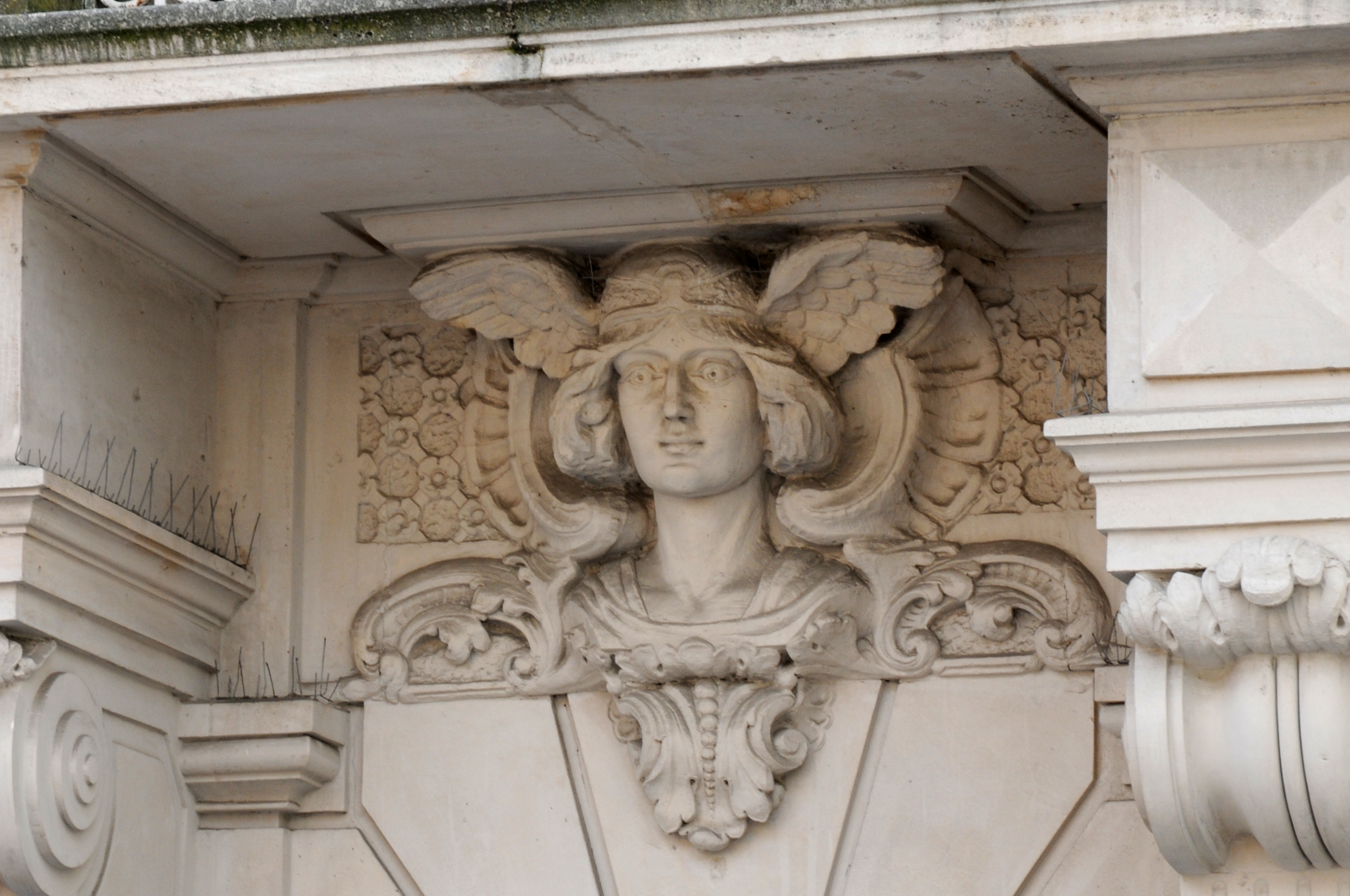 E Mascaron zu Esch.